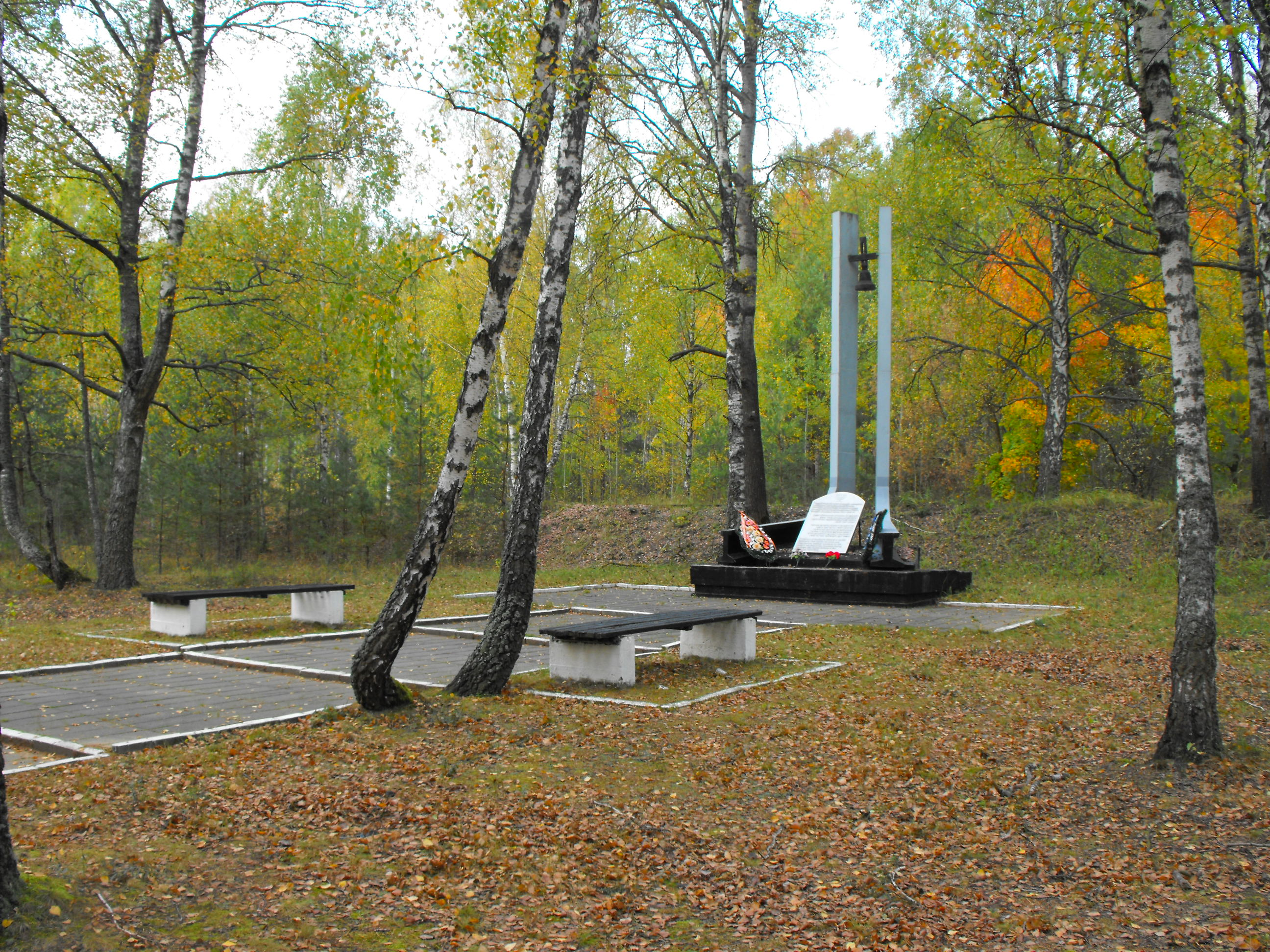 Бронная Гора. Памятник более 50 000 евреям, убитым в этом месте во времена Холокоста.